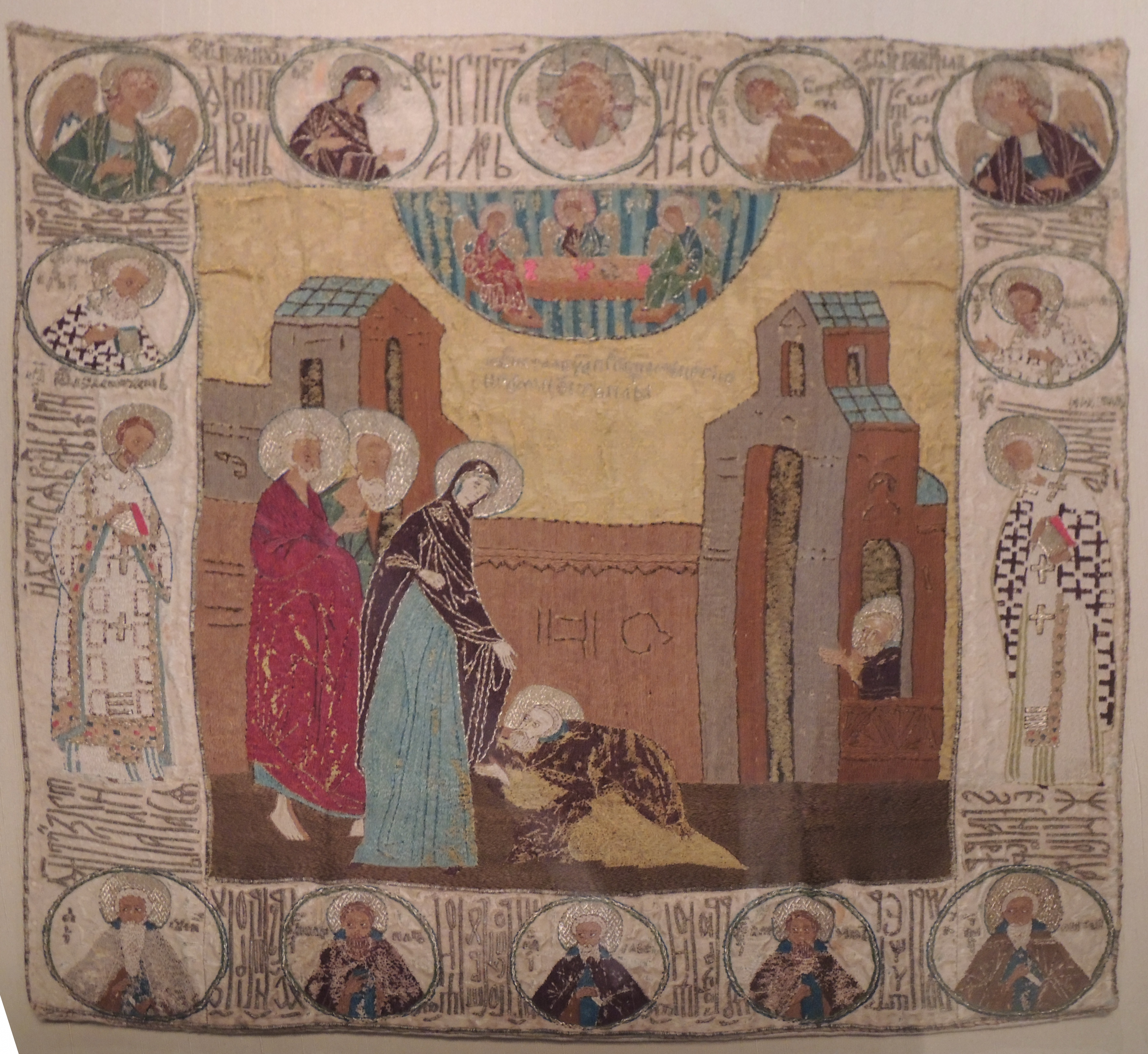 Выставка "Великий князь и государь всея Руси Иван III".